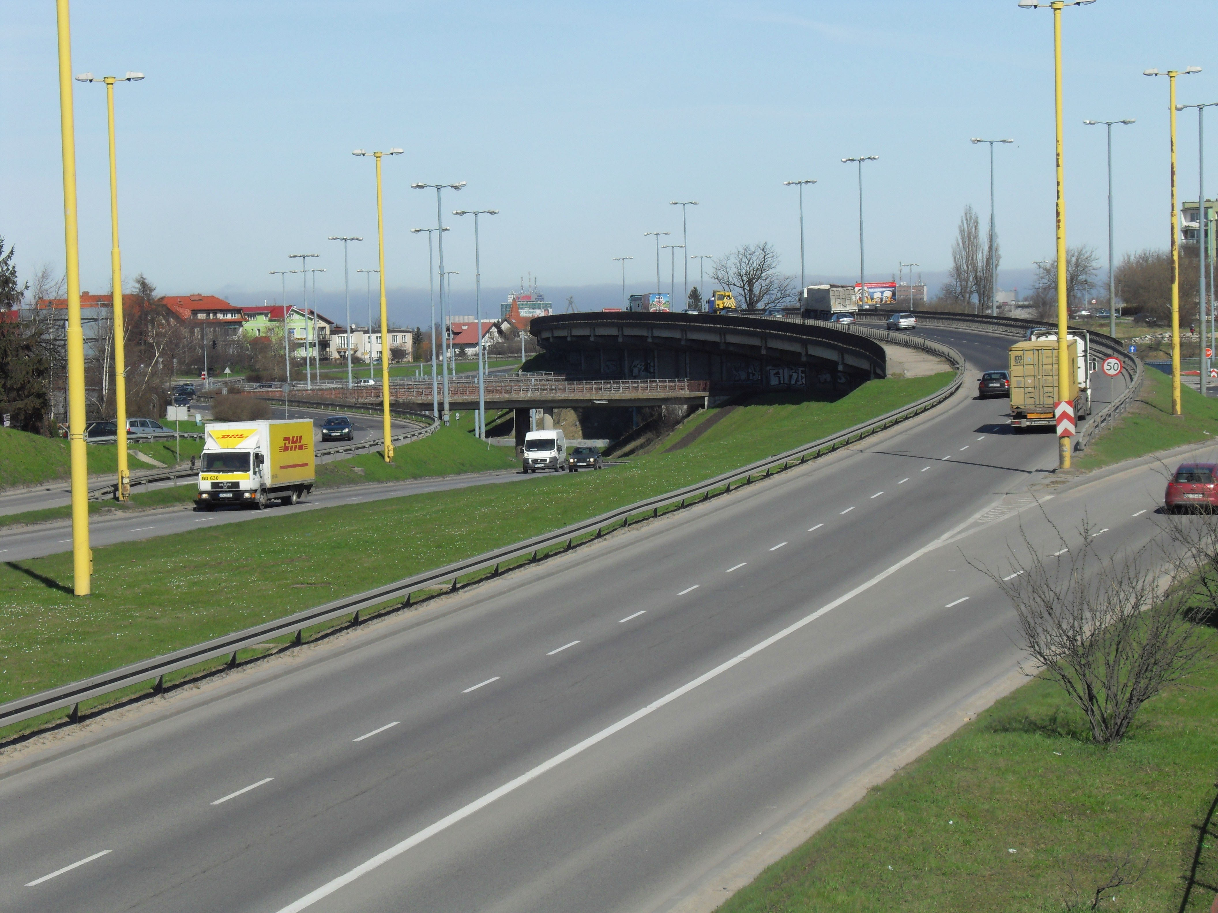 Trasa W-Z w Gdańsku, widok w kierunku wschodnim (w kierunku centrum miasta), po prawej osiedle Chełm.